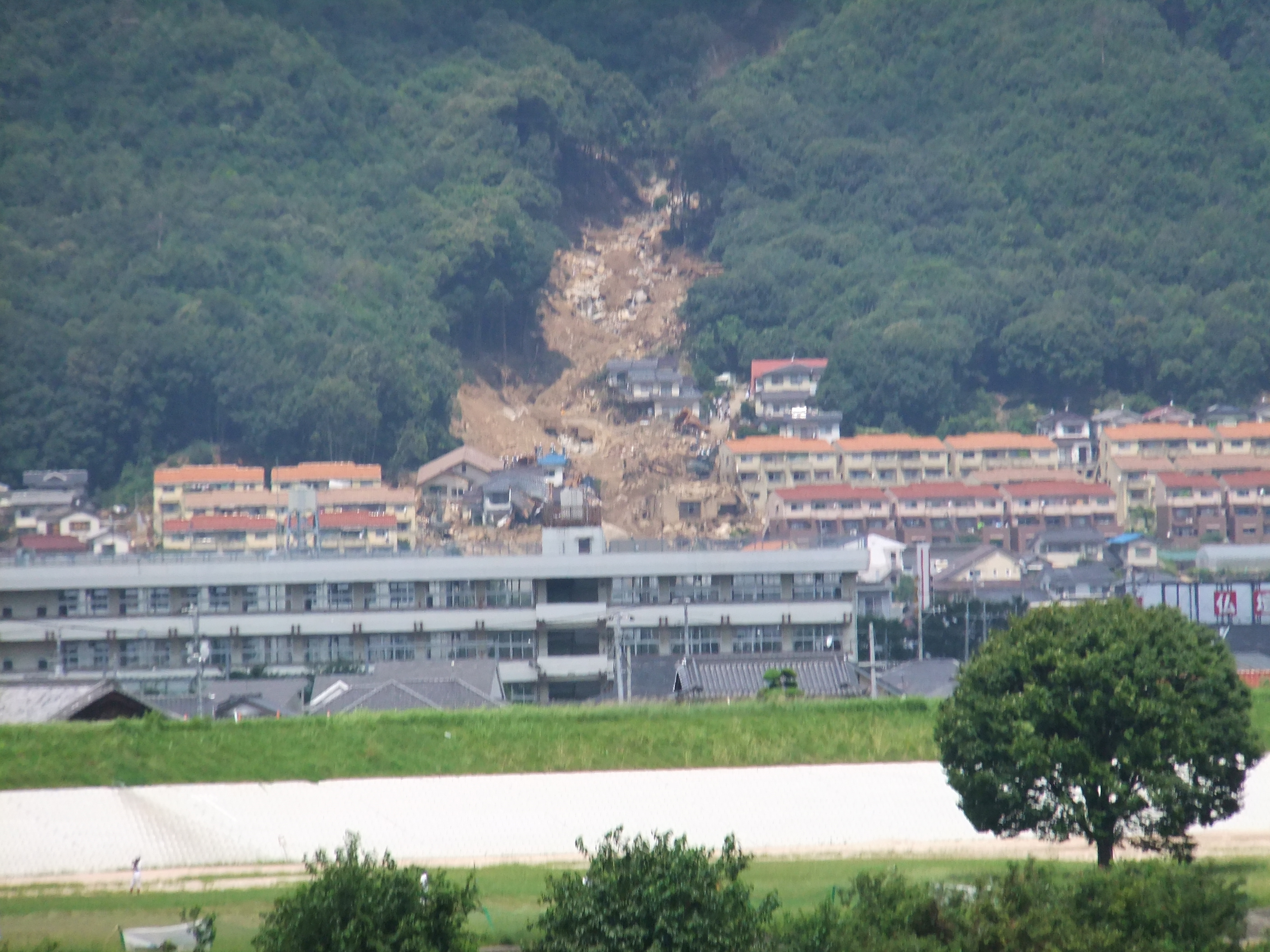 2014年8月の広島の豪雨被害（八木地区）